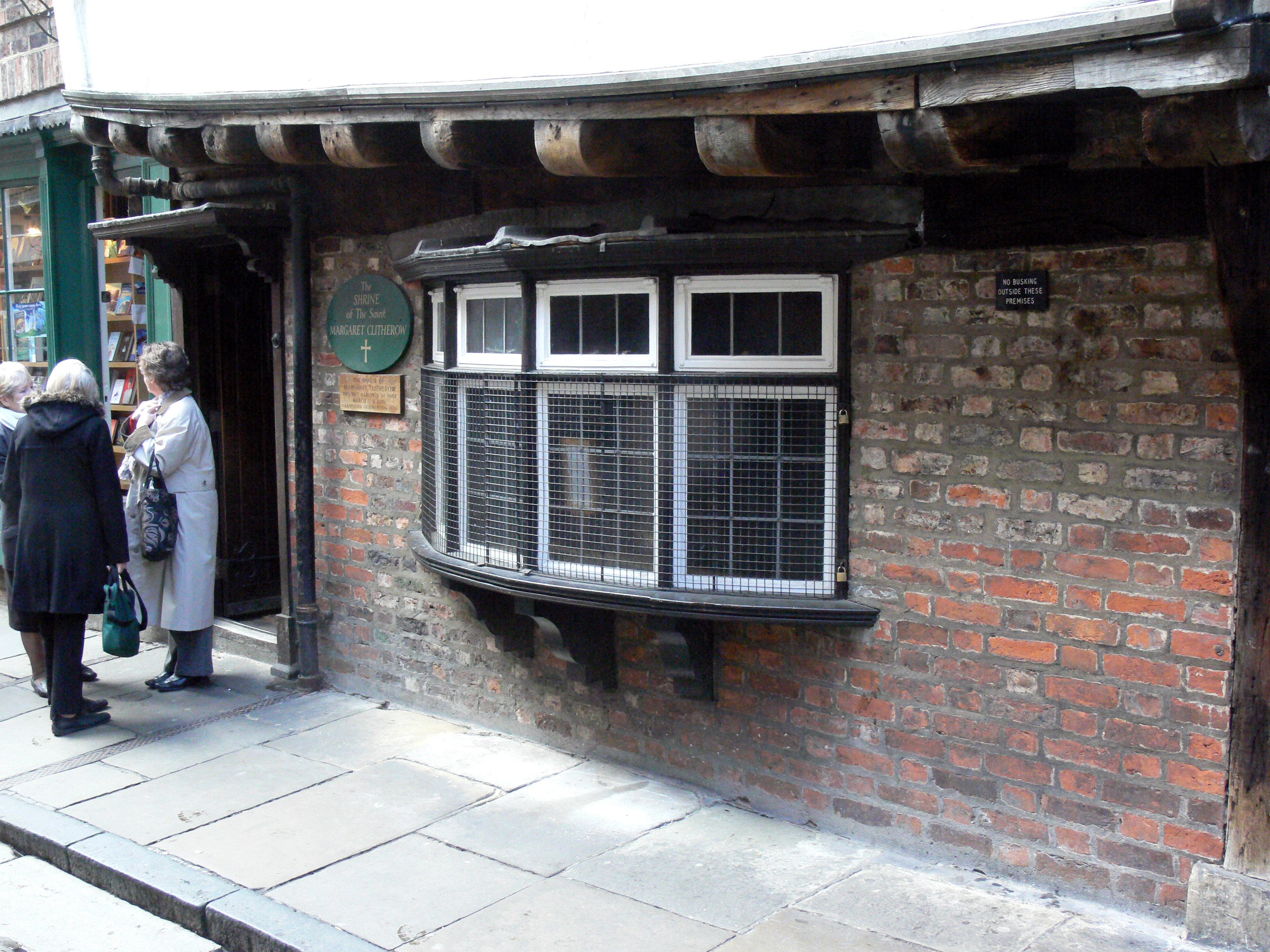 The Shrine of The Saint Margaret Clitherow in The Shambles. Eine Gedenkstätte der Fleischersgattin Margaret Clitherow. Sie nahm an einer Messe teil, als die Katholiken verfolgt wurden und versteckte Jesuiten auf ihrem Dachboden. Sie wurde deshalb 1586 hingerichtet, indem man sie unter einer mit Steinen beschwerten Türe erdrückte. Sie wurde 1970 heiliggesprochen.